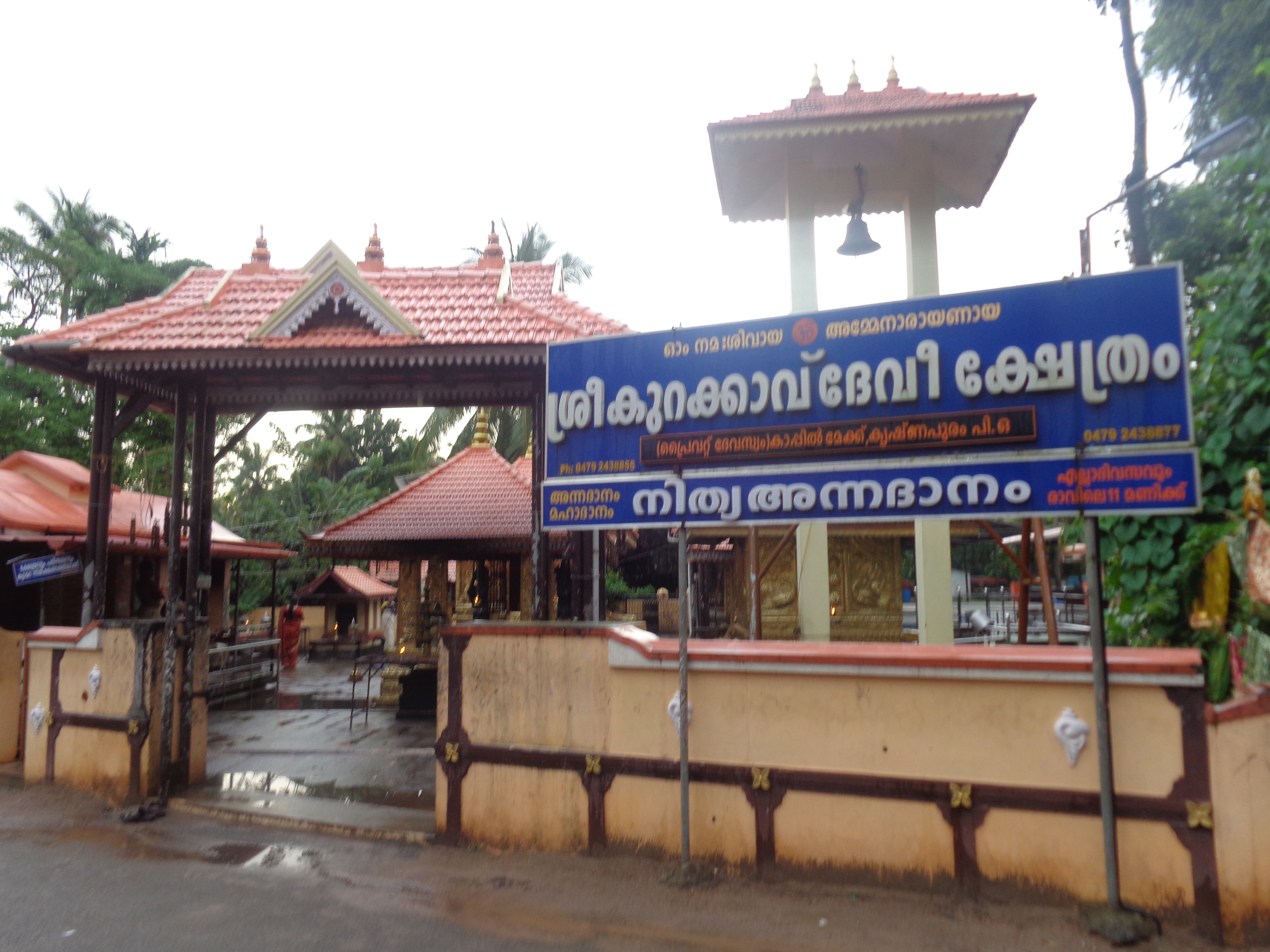 kurakkavu devi temple, krishnapuram, kayamkulam